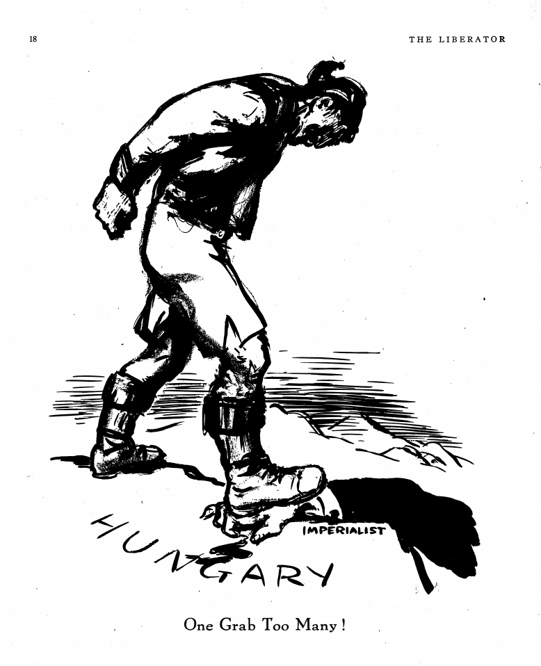 «One Grab Too Many», en el número de mayo de 1919 de The Liberator.